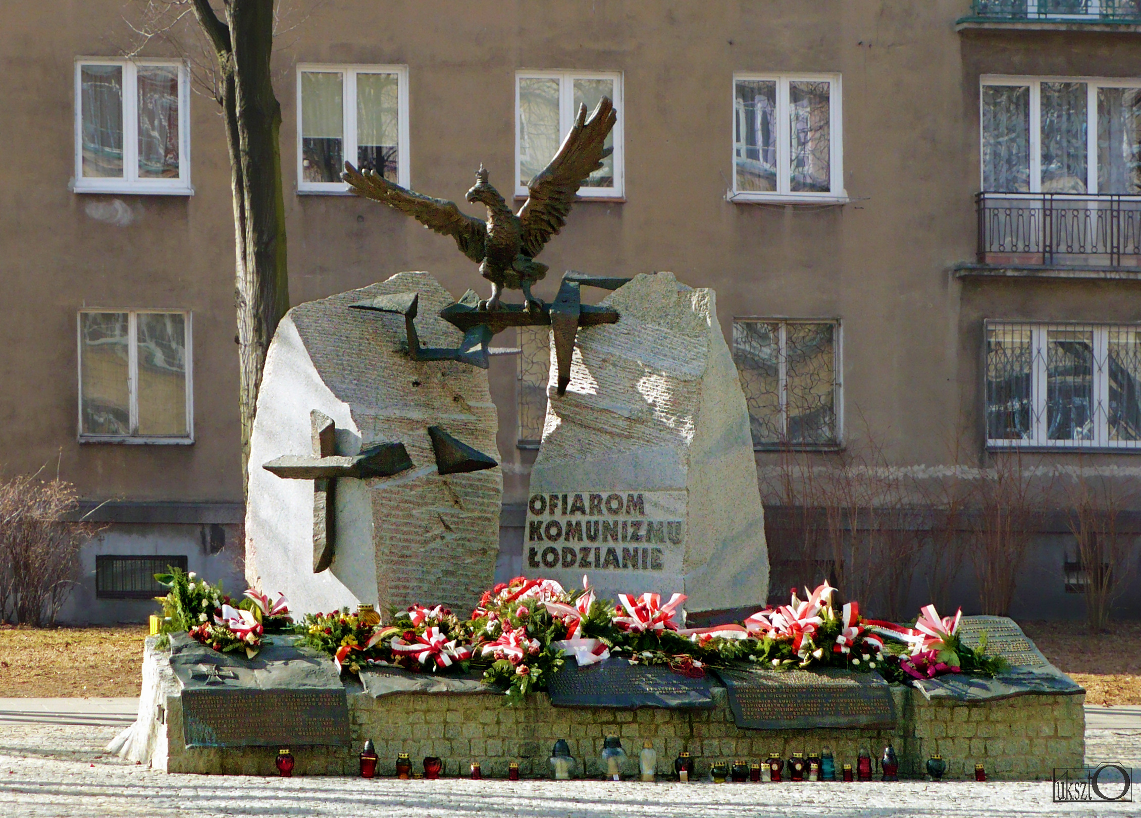 Łódź, Pomnik Ofiar Komunizmu.